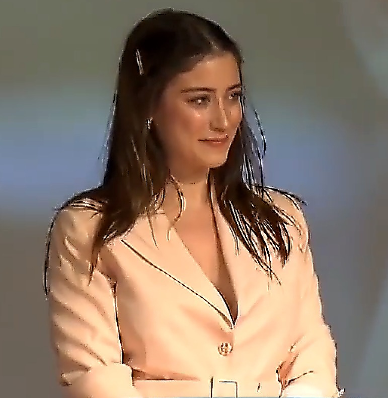 İstanbul Aydın Üniversitesi İletişim Ödülleri’nde Bizim Hikaye dizisiyle ‘En İyi Kadın Oyuncu’ ödülüne layık görülen Hazal Kaya, konuşmasını “Her şey çok güzel olacak” sözleriyle tamamladı.